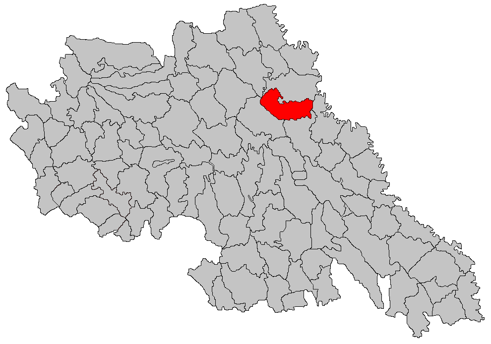 Categorie:Hărţi ale judeţului Iaşi